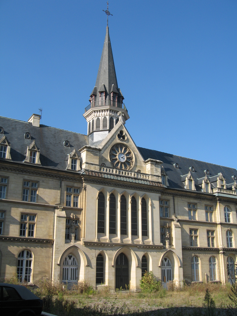 Ancienne chapelle du Bon Sauveur depuis la grande cour